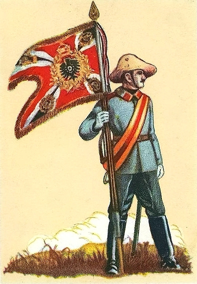 Standarte und Reiter des Ostasiatischen Reiter-Regiments um 1900